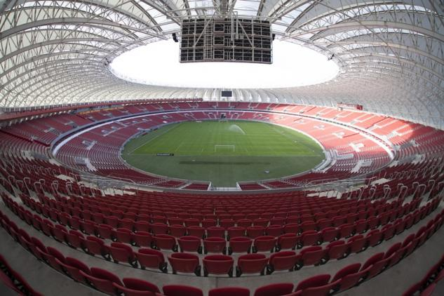 Interior do Estádio Beira-Rio, Porto Alegre-RS